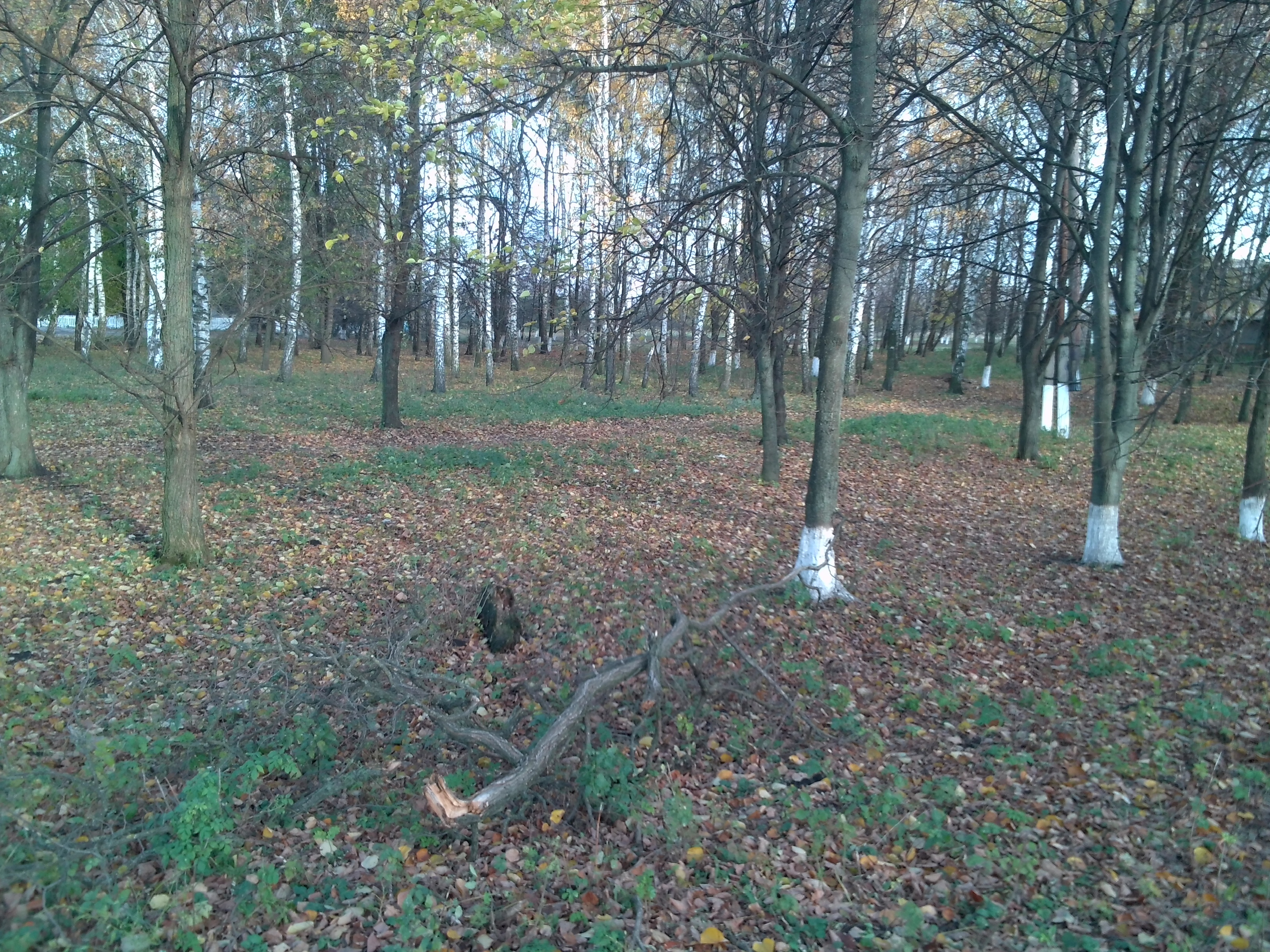 с. Вербівка. Парк